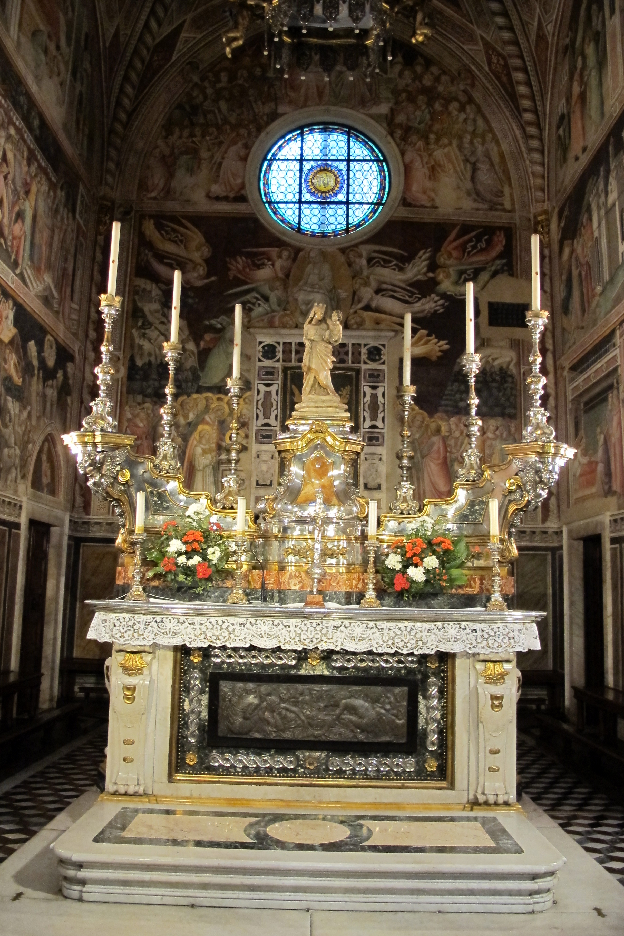 Duomo di Prato